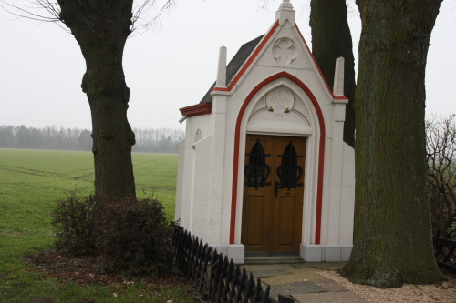 Sankt Anna Kapelle in Düren-Merken, Roermonderstraße